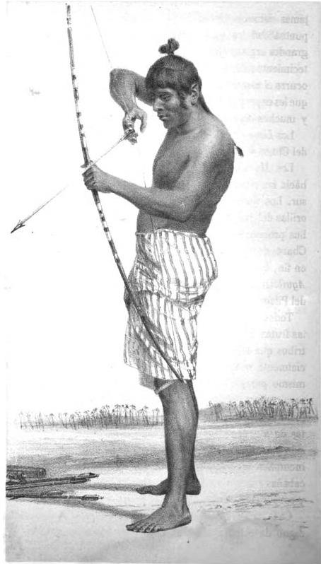 Cacique de los Indios Payaguas.